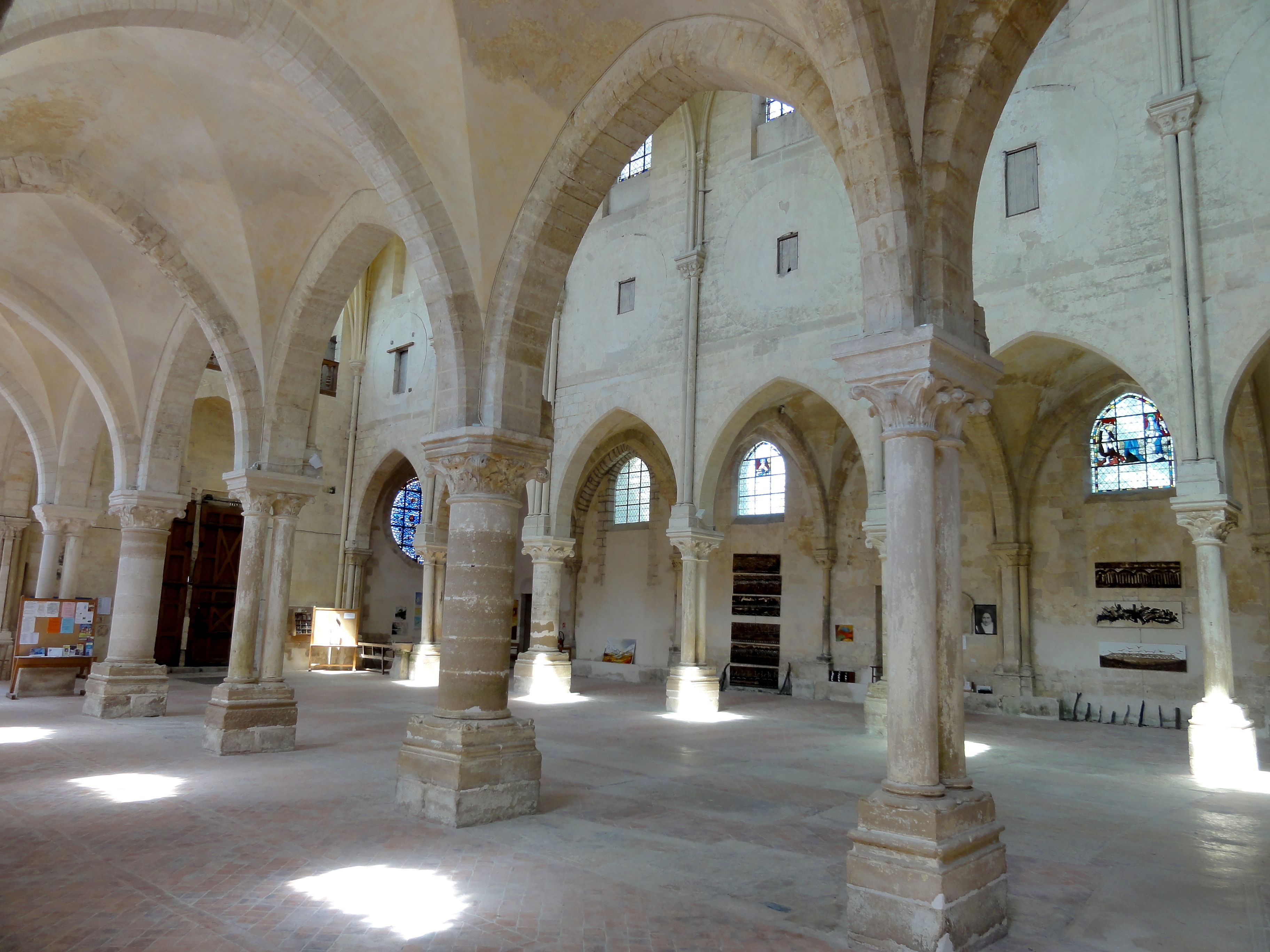 Bas-côté sud, vue vers le nord.